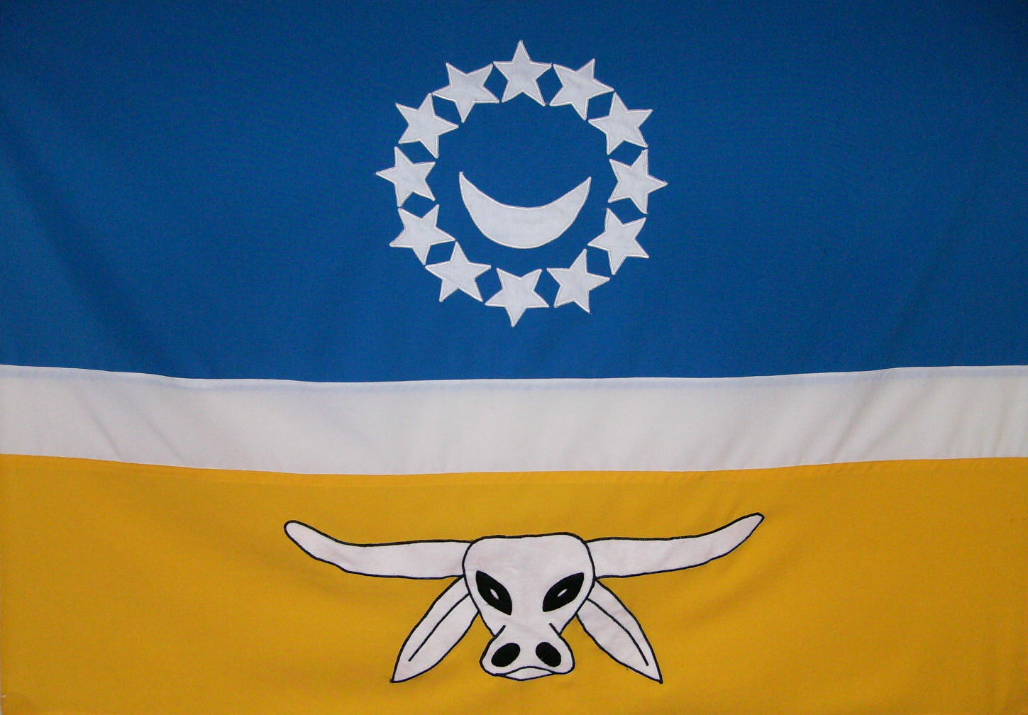 Bandeira do Municipio